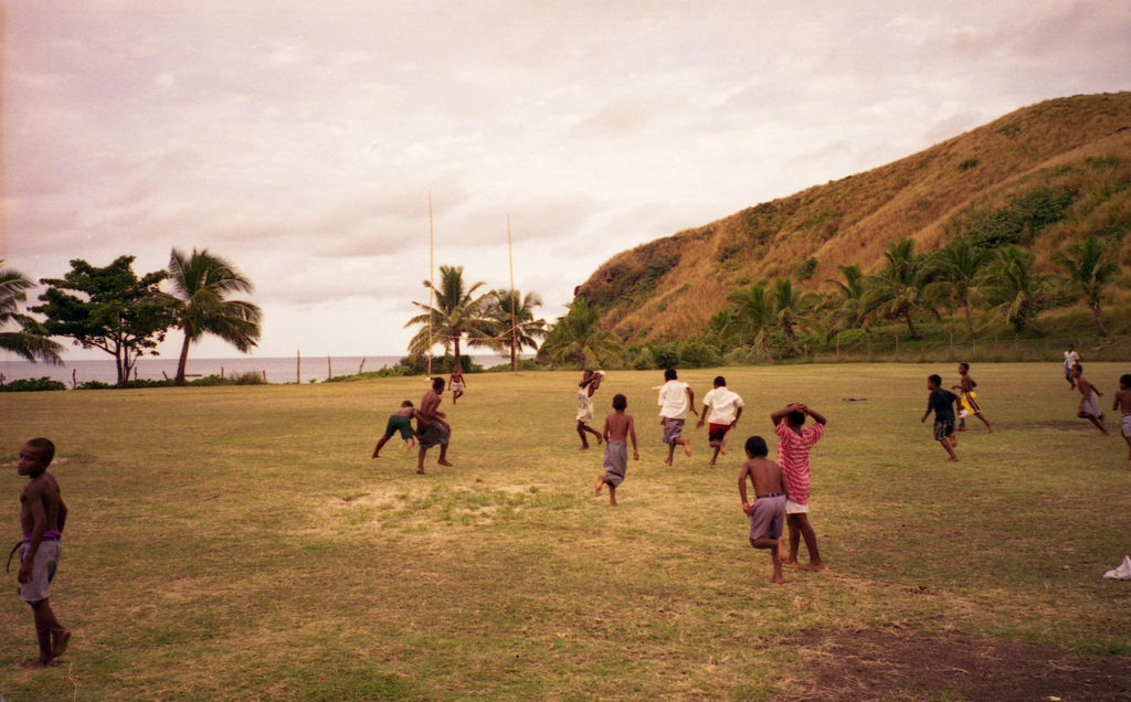 Fijian rugby (Flickr)